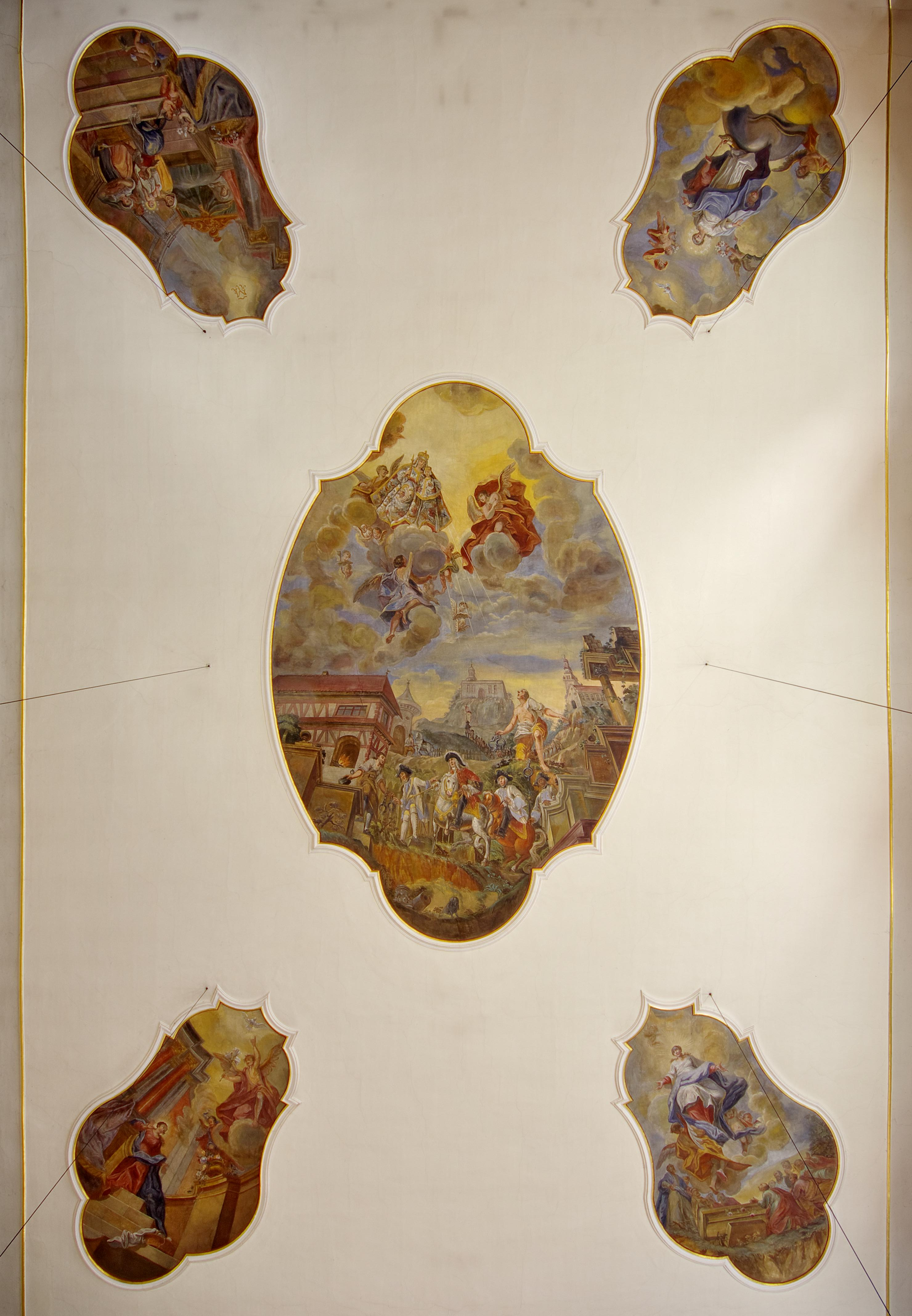 Wallfahrtskirche - Maria zu den Ketten in Zell am Harmersbach Deckenbilder